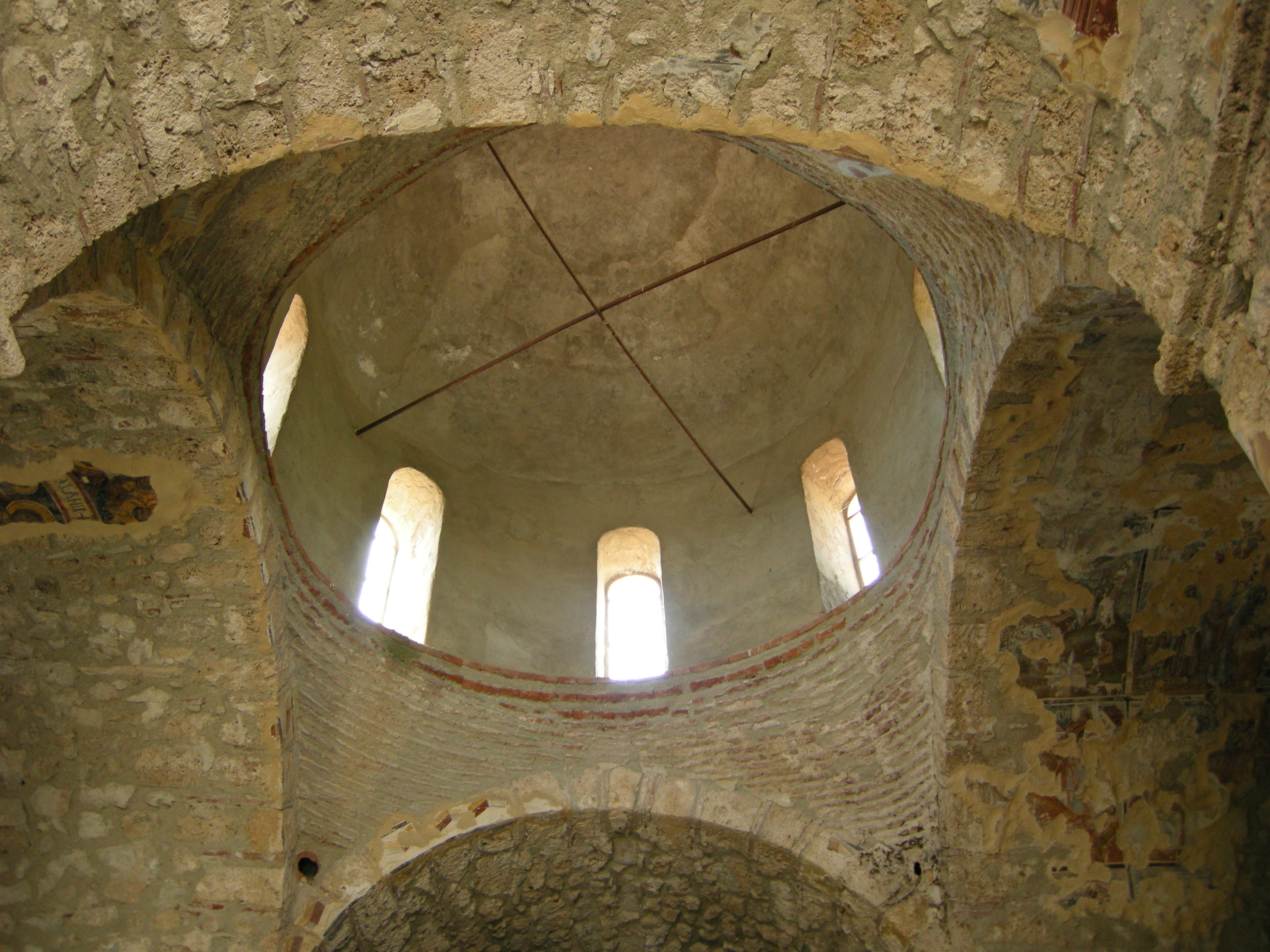 Agios Nikolaos, dome